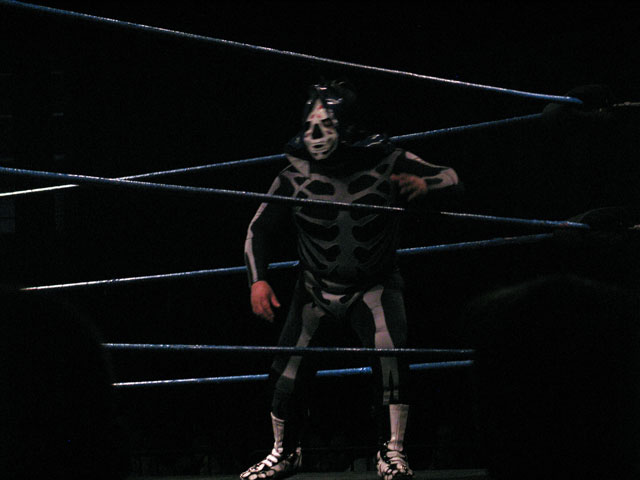 La Parkita, Chikara, August 2007.